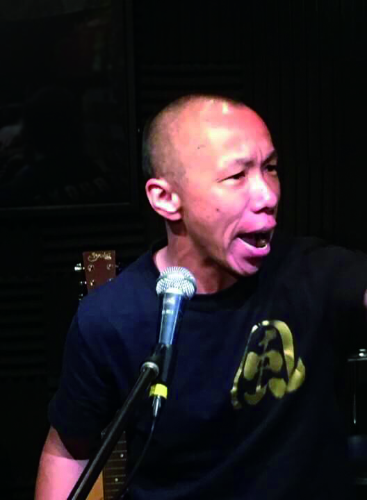 沖縄のライブハウスで飛び込み参加をし、講談風語りをしている痴山臣蔵